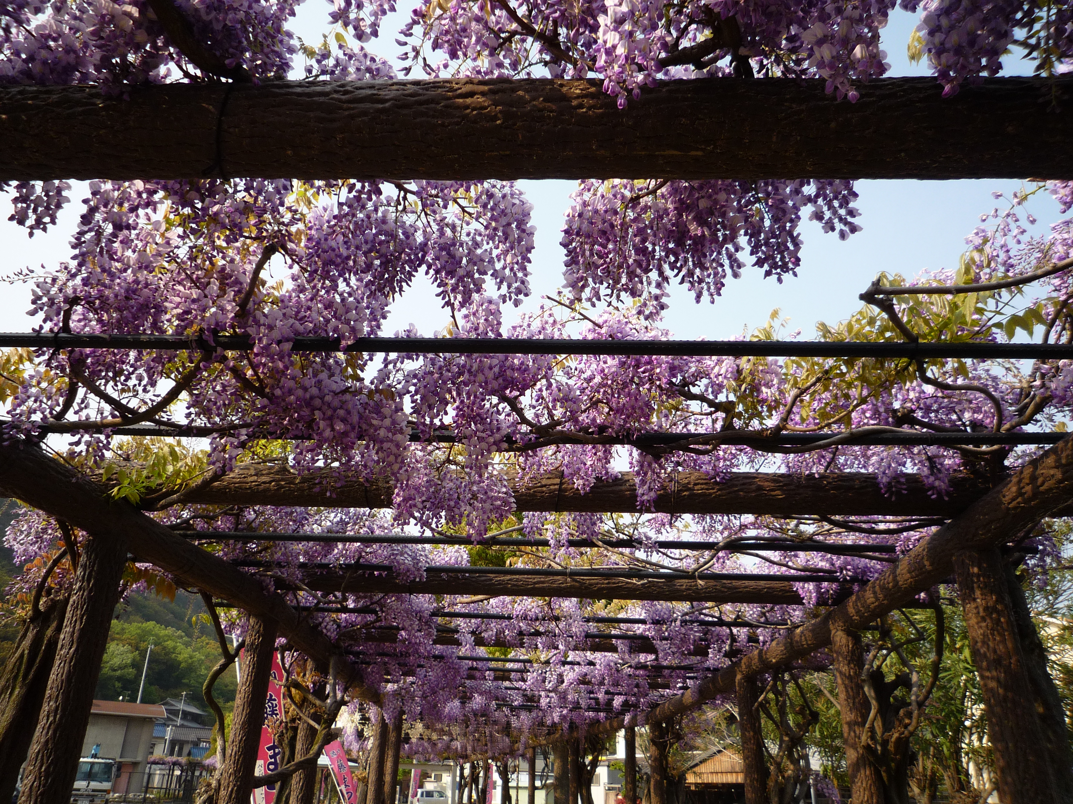 岡山県玉野市 渋川公園の藤棚